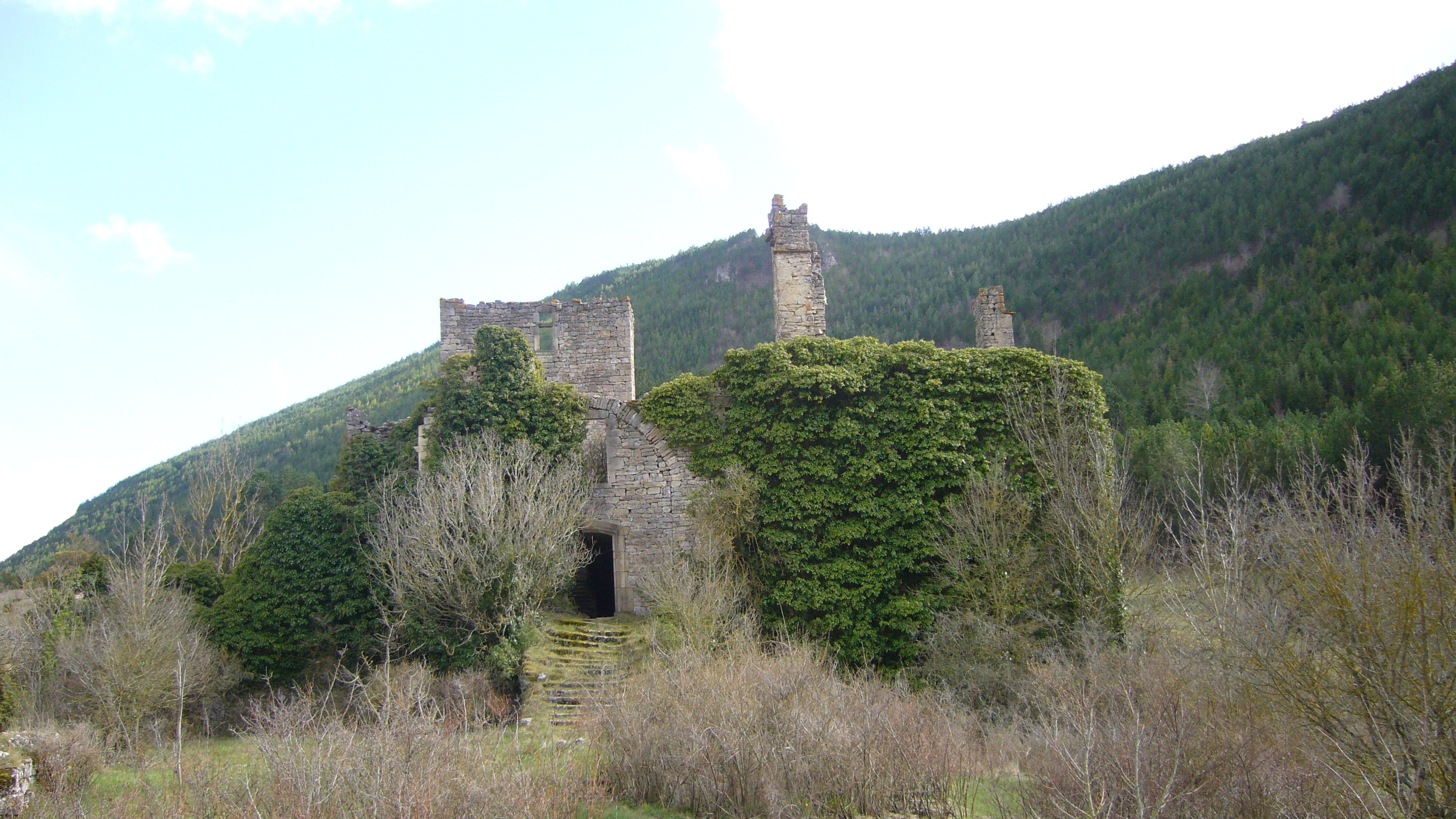 Le château de Montialoux, commune de Saint-Bauzile, Lozère, France